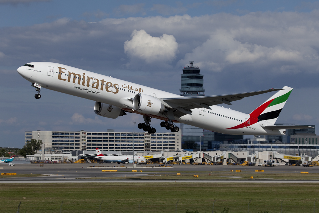 A6-ECQ B777-300 Emirates